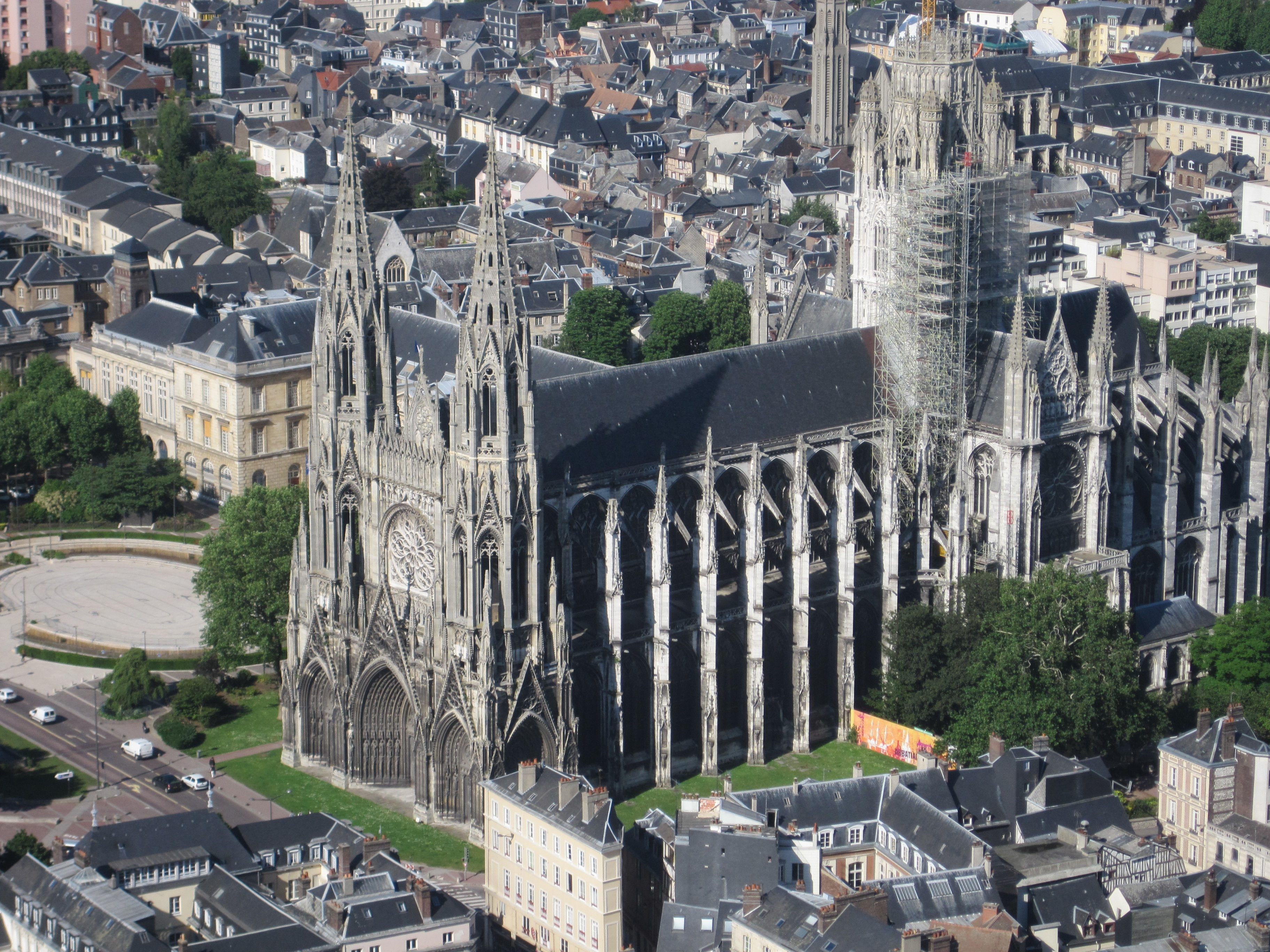 Photographie prise du haut de la flèche de la Cathédrale Notre-Dame de Rouen